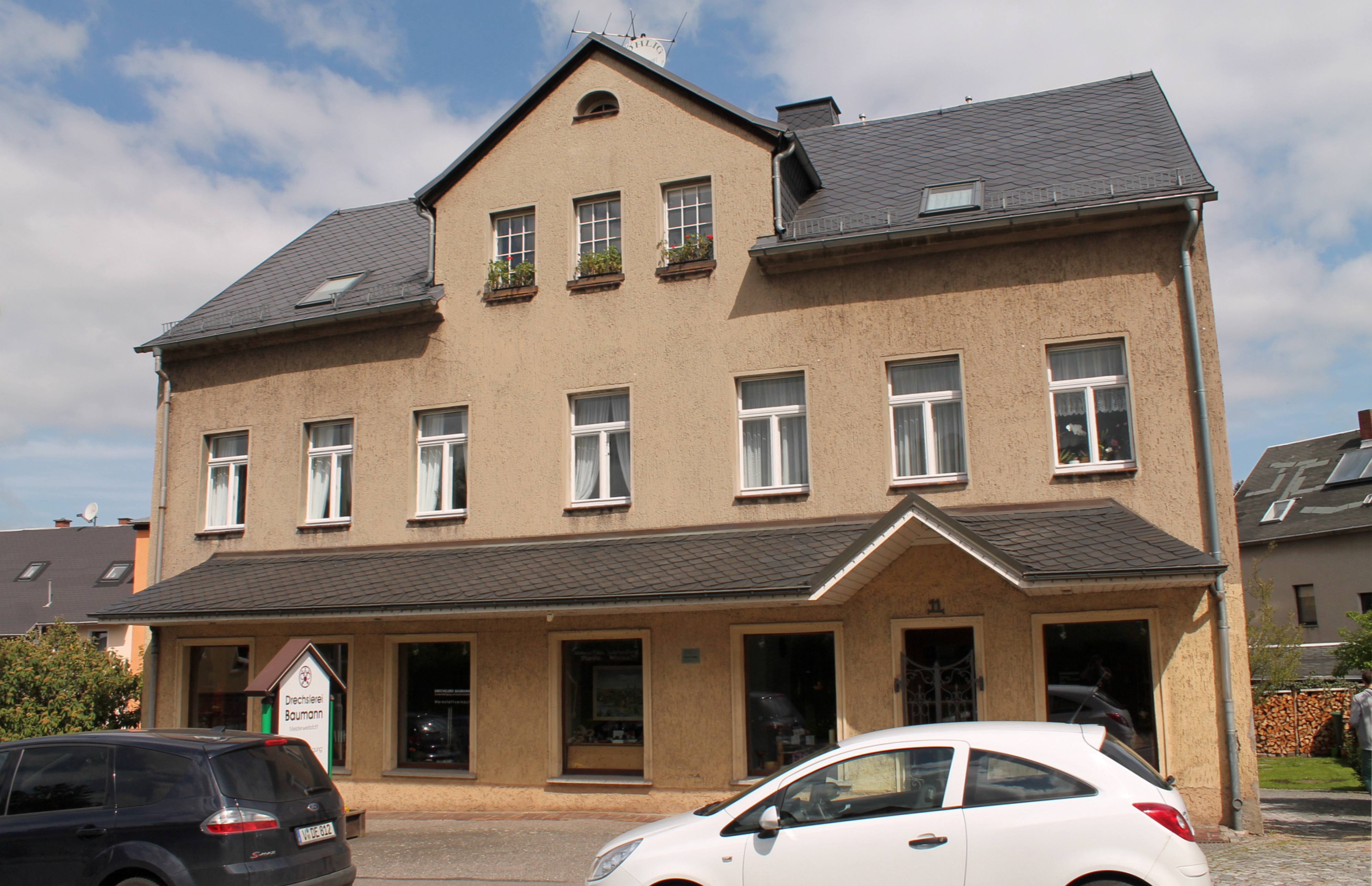 Geburtshaus des Schauspielers Gert Fröbe in Oberplanitz. Zwickau, Sachsen, Deutschland.